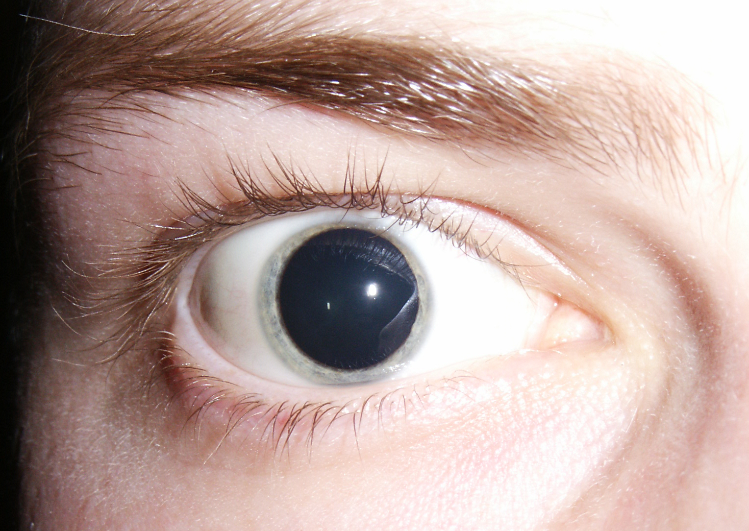 Mydriasis - een abnormaal verwijde pupil.